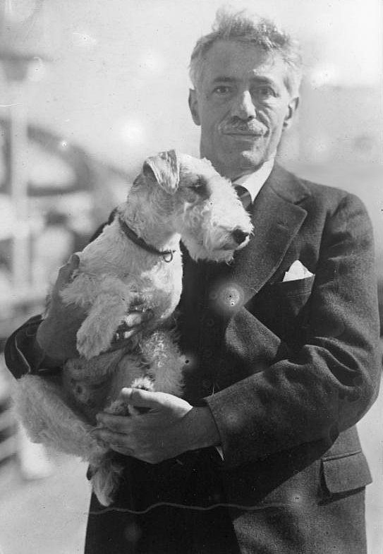 Der berühmte deutsche Violin-Virtuose Prof. Fritz Kreisler an Bord der "Europa" nach New York! Der berühmte deutsche Künstler will dort einige grosse Conzerte geben. Ein Teil der Ertragnisse wird für bedürftige deutsche Kinder verwandt.